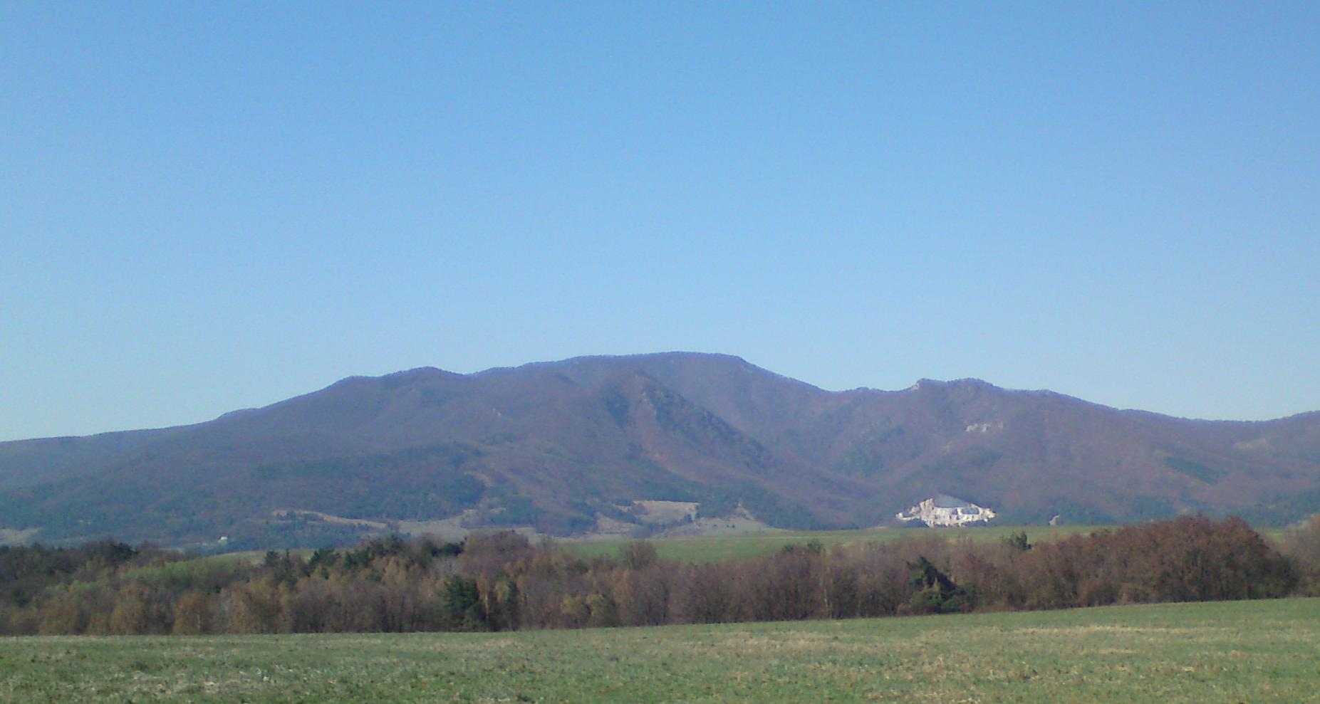 Pohľad z východu